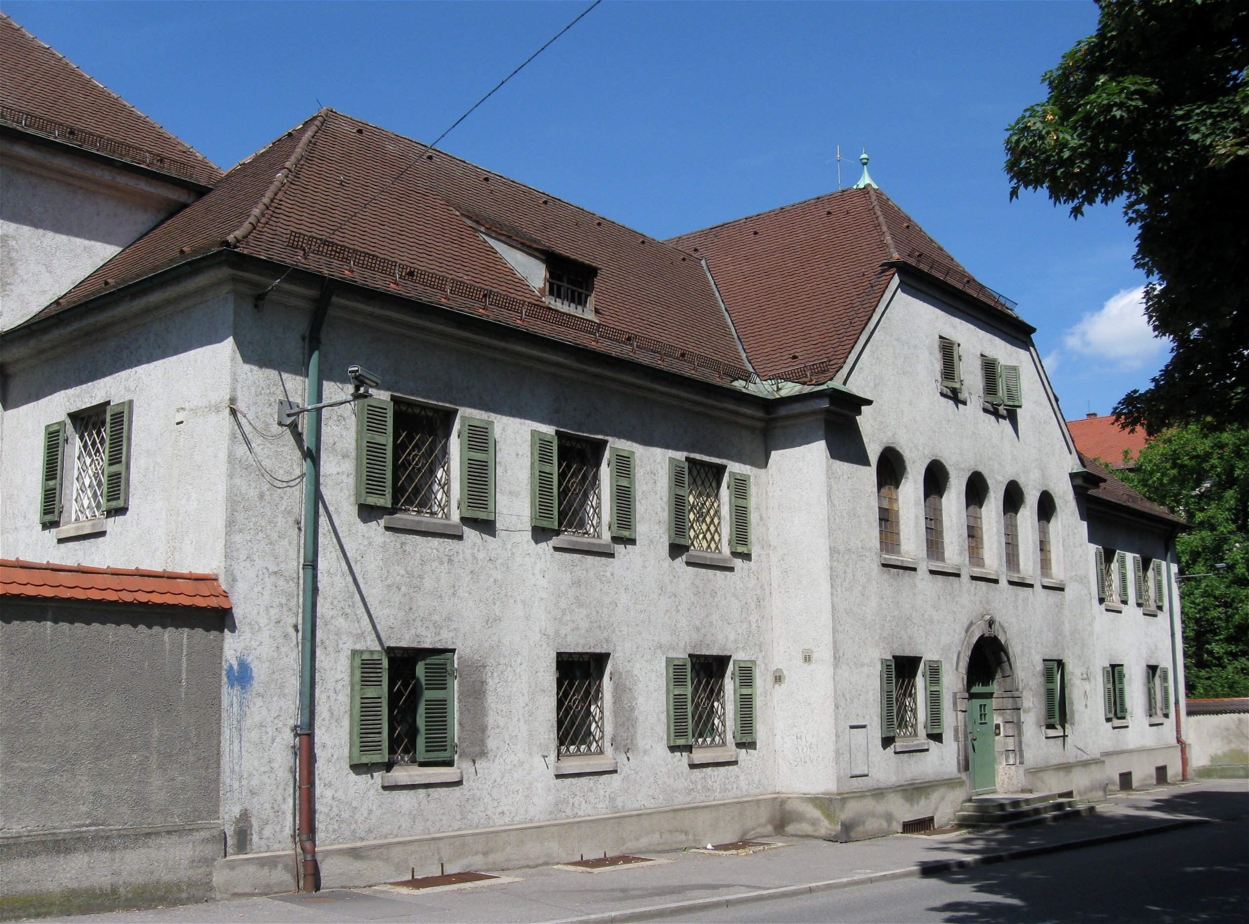 Innere Münchener Straße 4; Innere Münchener Straße 2. Ehem. Amts- und Landgerichtsgefängnis, Dreiflügelbau mit zweigeschossigem Mittelteil und fünfgeschossigen Zellentrakten, verputzte Ziegelbauten mit Walmdächern und Eckturm, 1907; Ringmauer, verputzte Ziegelmauer mit Bedachung, gleichzeitig.